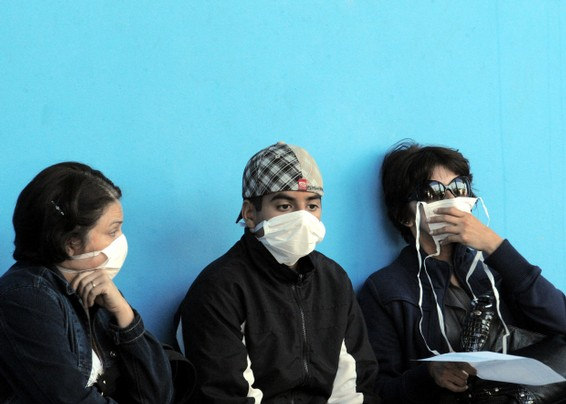 Pacientes do Hospital Regional da Asa Norte, no Plano Piloto, recebem máscaras e são encaminhados para a área destinada aos casos suspeitos da gripe A (H1N1). O hospital chega a atender cerca de 90 pacientes por dia.